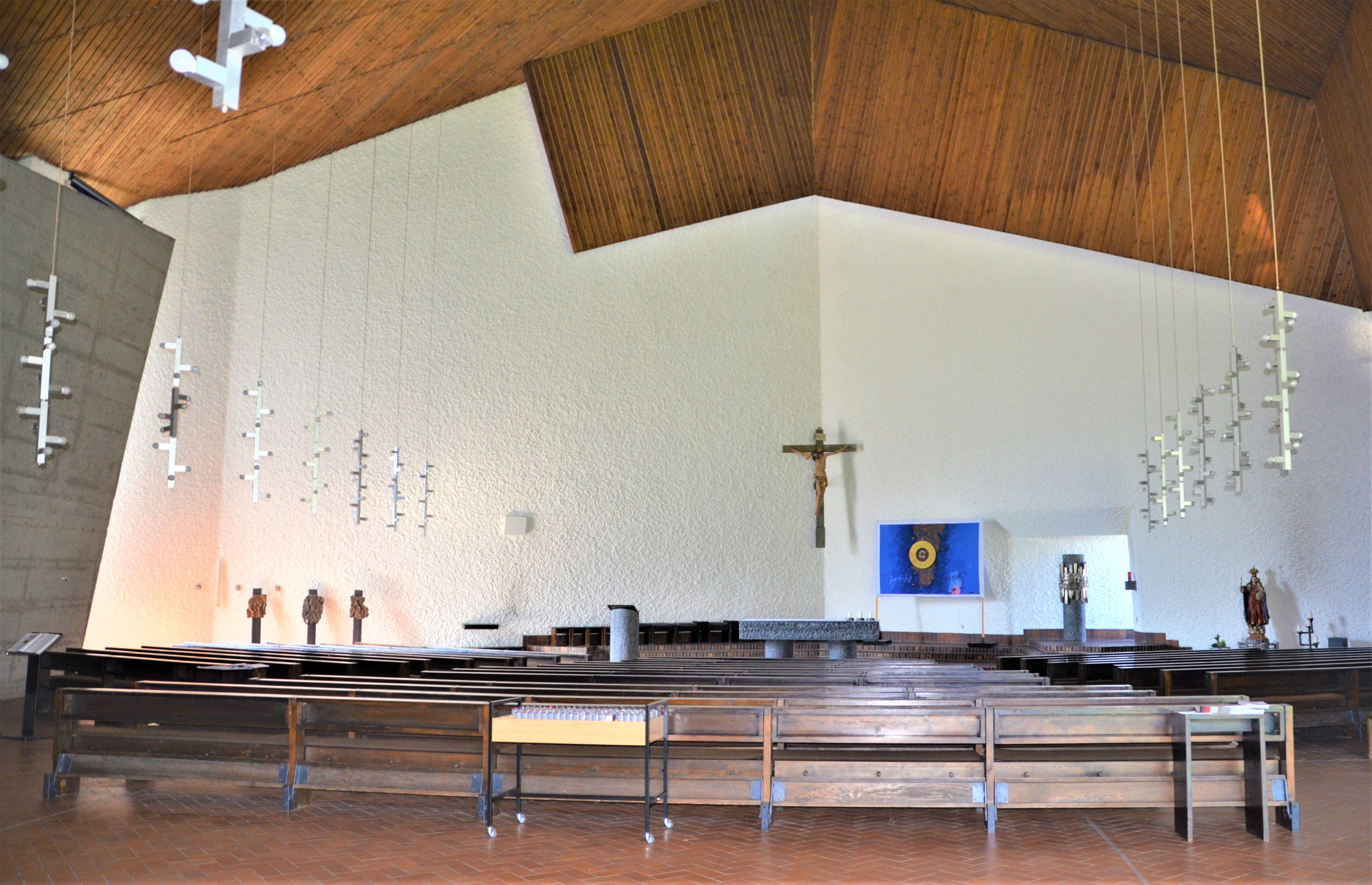 Innenraum der St. Michaels-Kirche in der Weststadt von Schwäbisch Gmünd